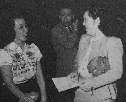 田中園子（左・ピアニスト）と笹田和子（右）。ユーディ・メニューイン訪日公演時。